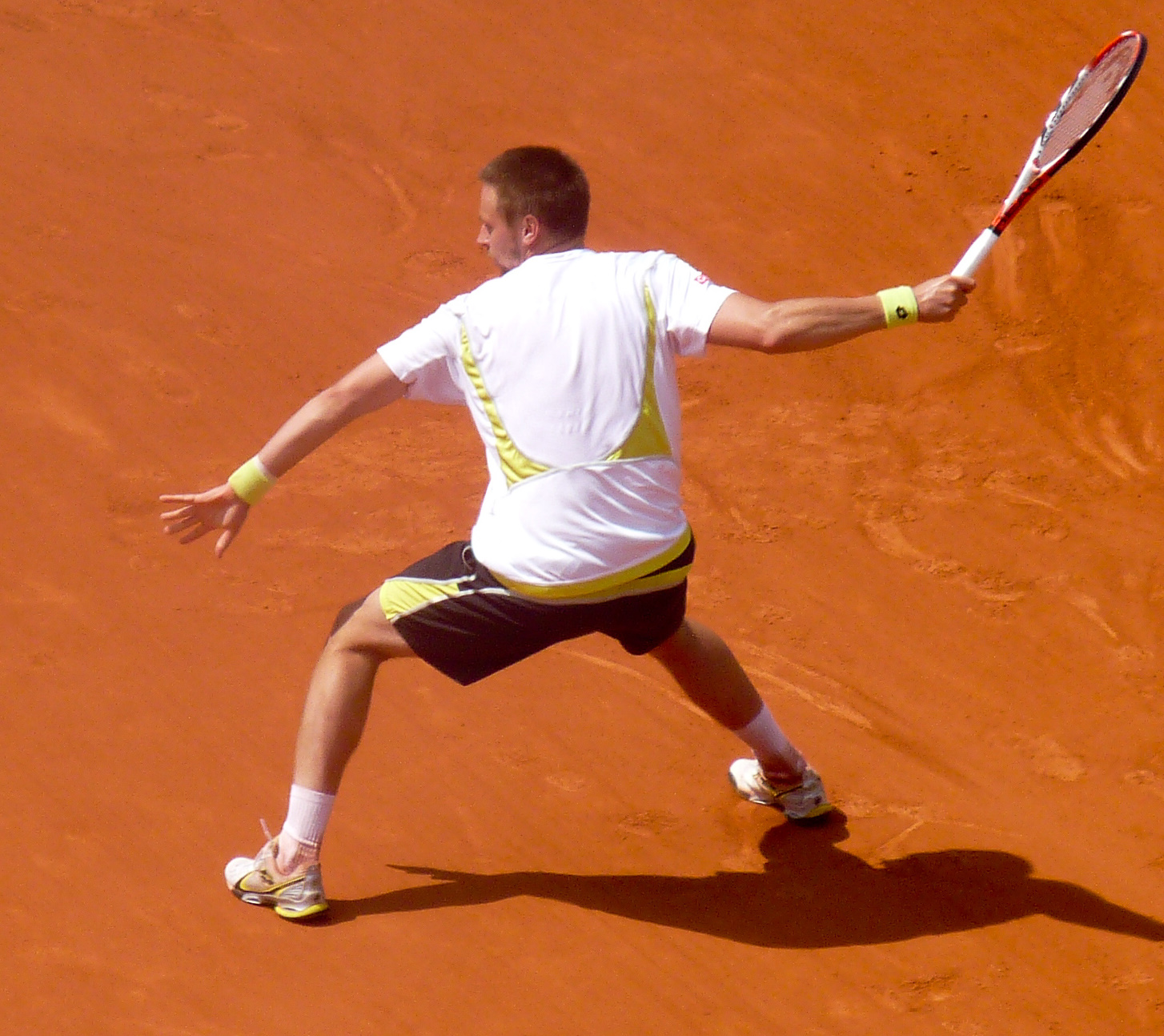 Robin Söderling against Fernando González in the 2009 French Open semifinals